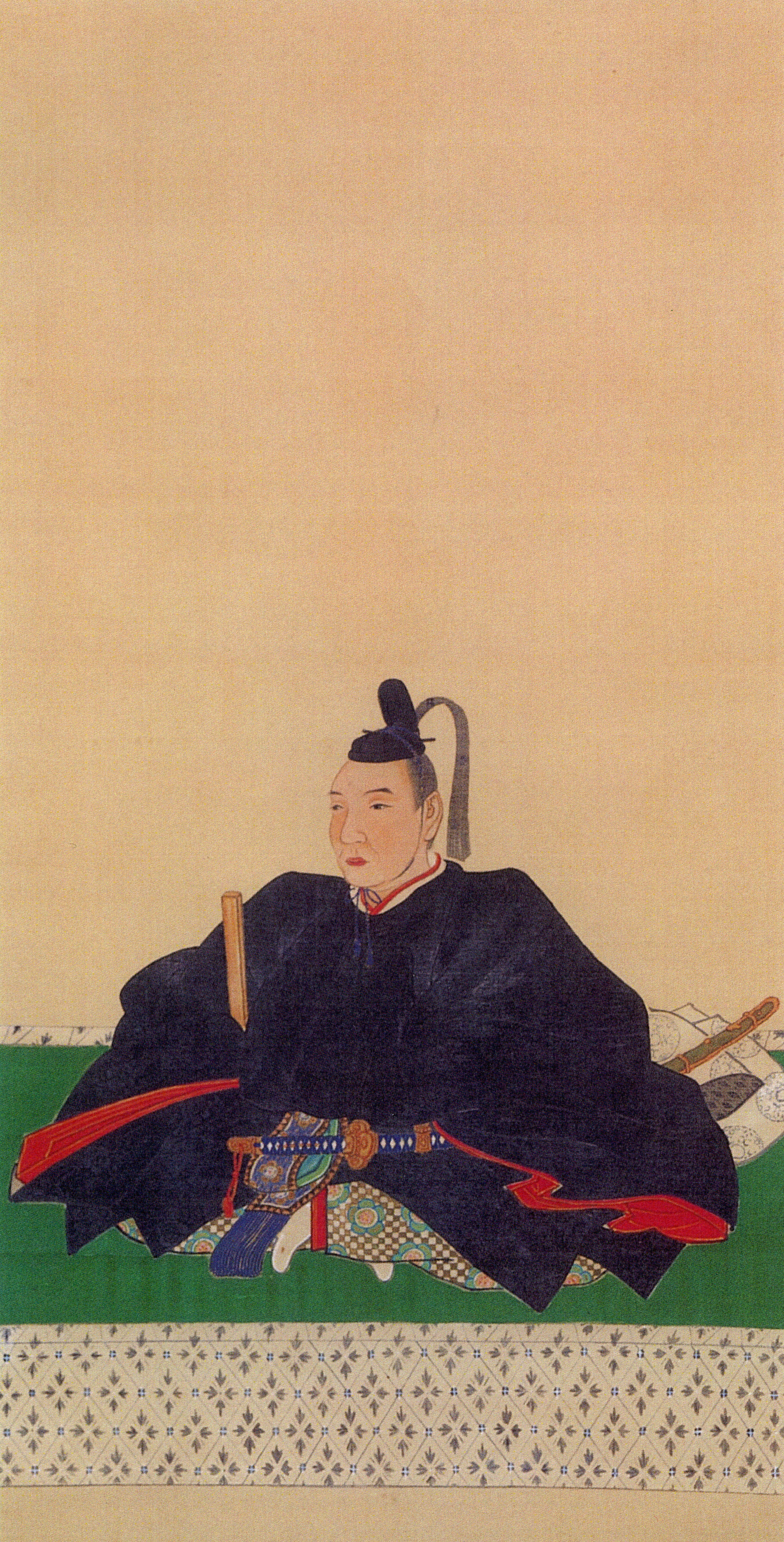 織田信勝の肖像。